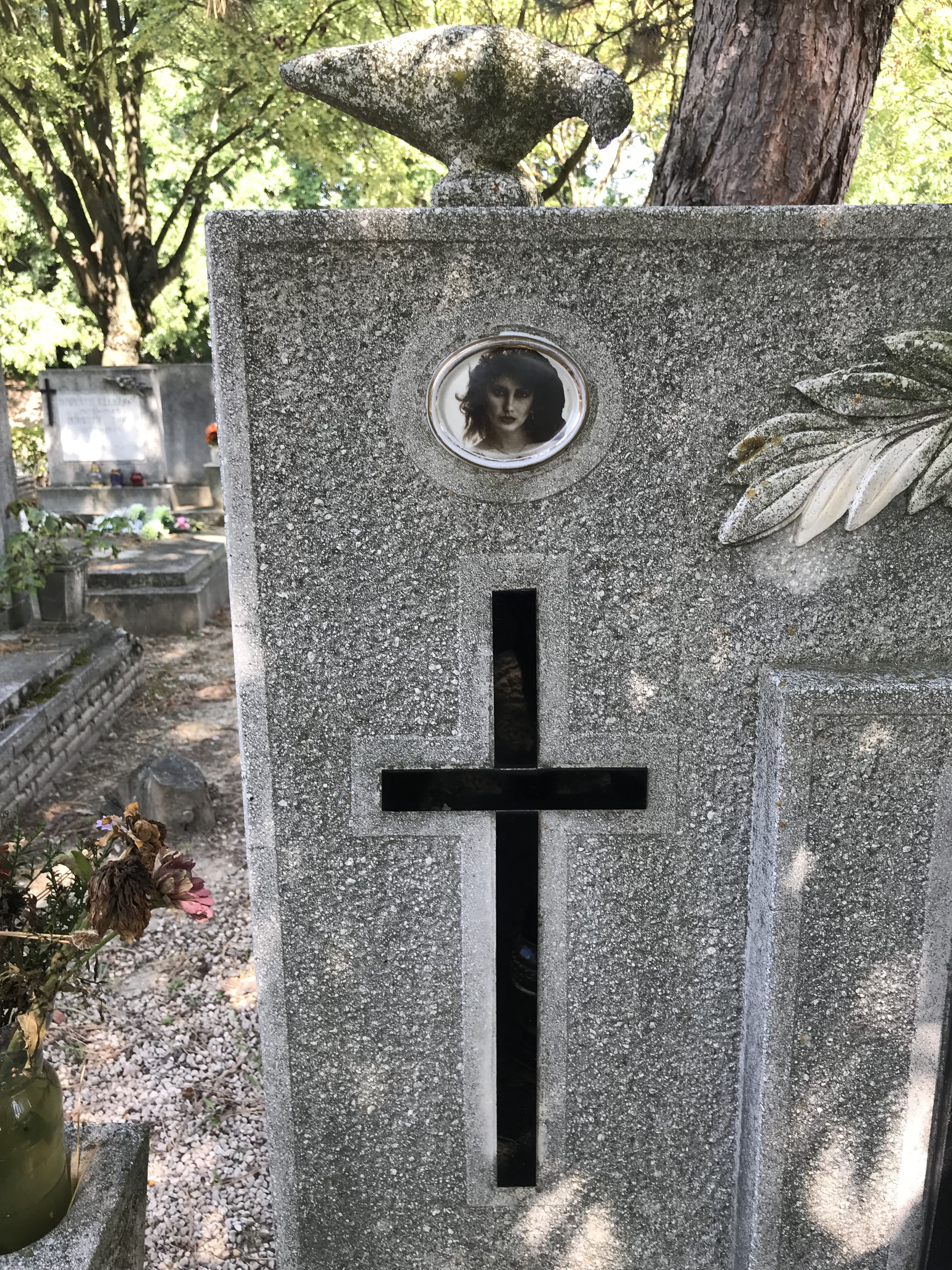 Lantos Piroska síremléke, Béla úti új köztemető, Székesfehérvár I. parcella, B1/4.sor 3.